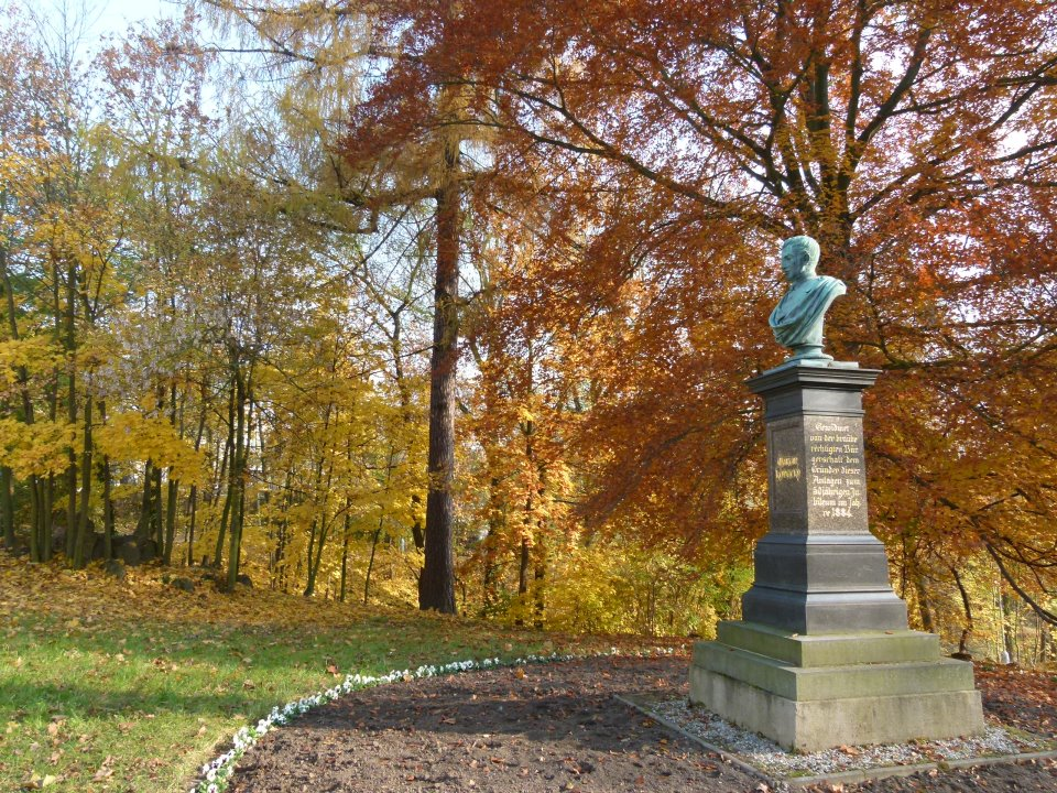 Pomník purkmistra Kopeckého